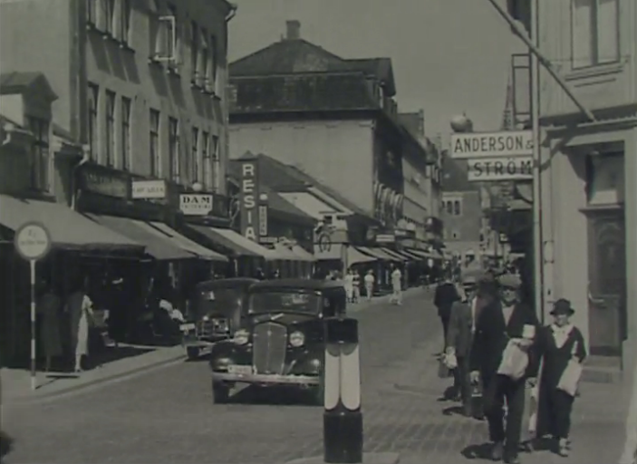 Varuhuset Resia 1938 på Stora Brogatan i Borås.